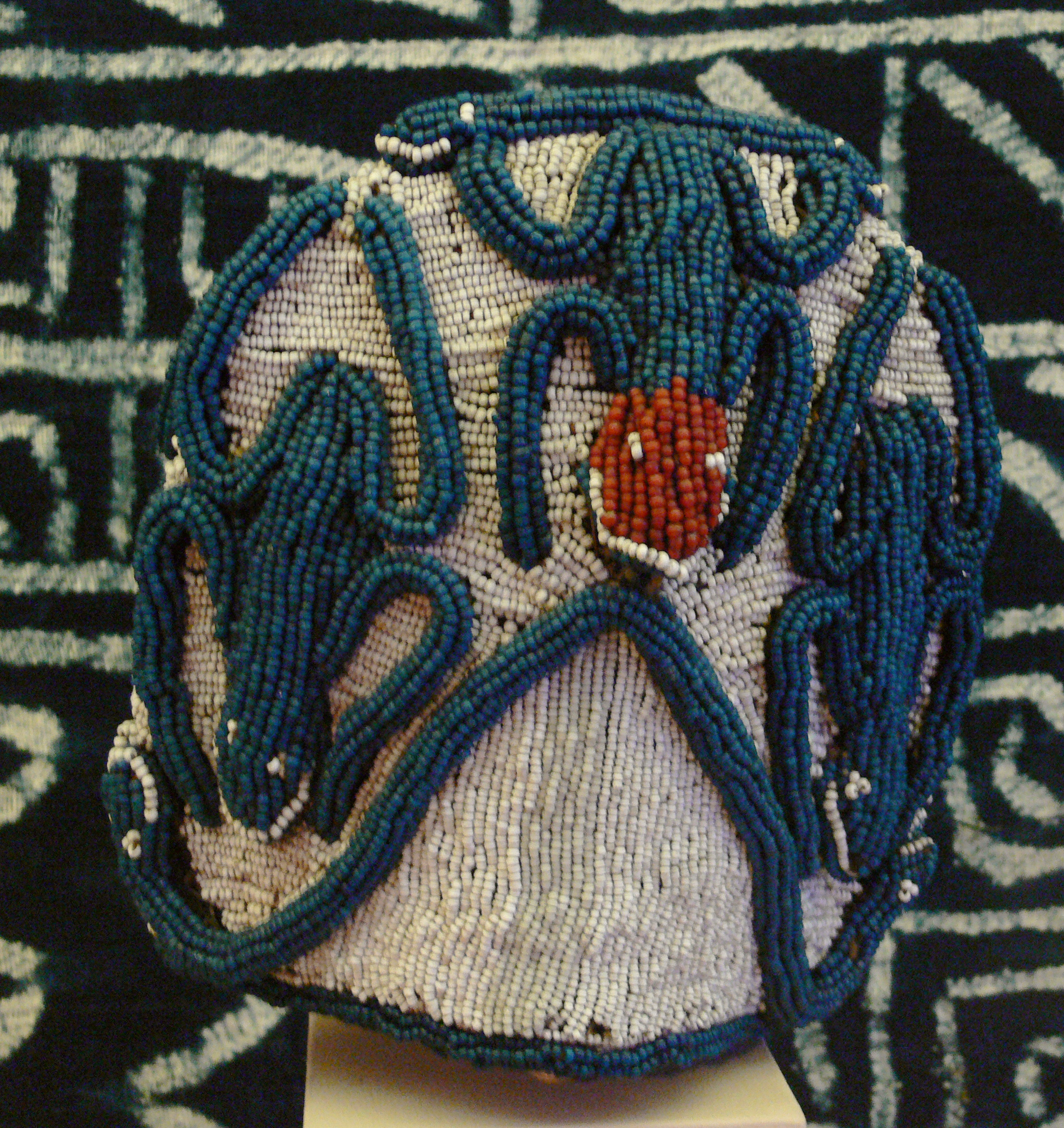 Stuttgart, Linden-Museum Mütze, Raffiafasern mit Glasperlen bestickt, Nso, Inv. Nr. 33548